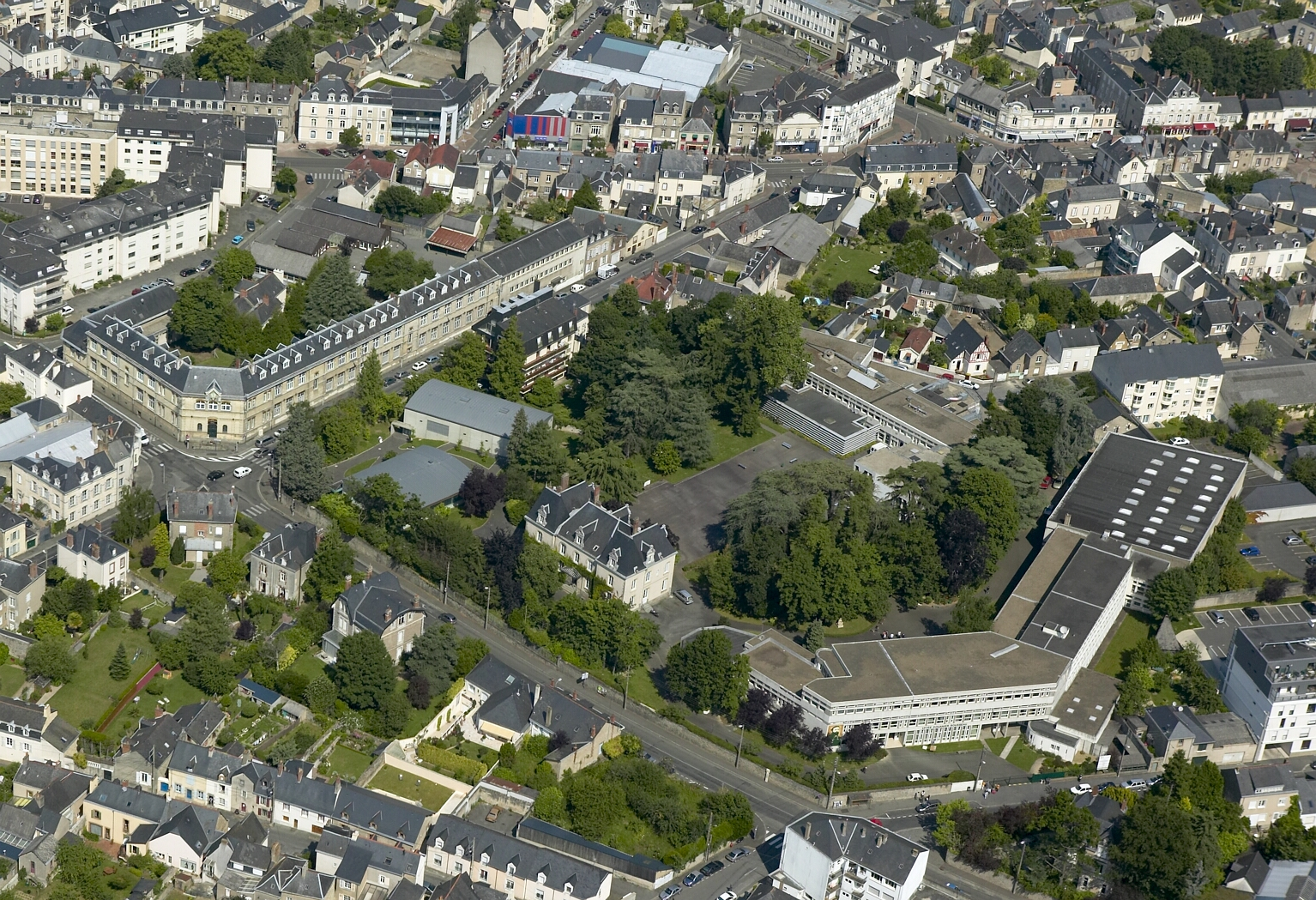 Photo aériennes du lycée Douanier Rousseau Laval